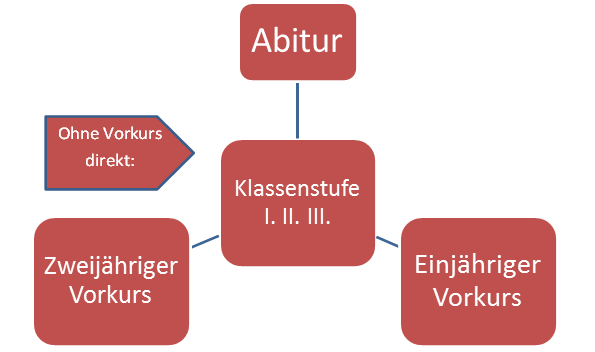 Infografik Zweig des Kollegs des Spätberufenenseminars